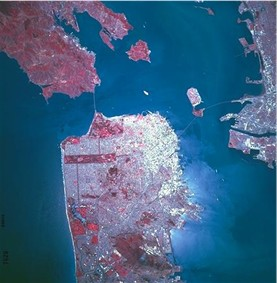 baai van SF van Gimp Savvy Foto:NASA open bron